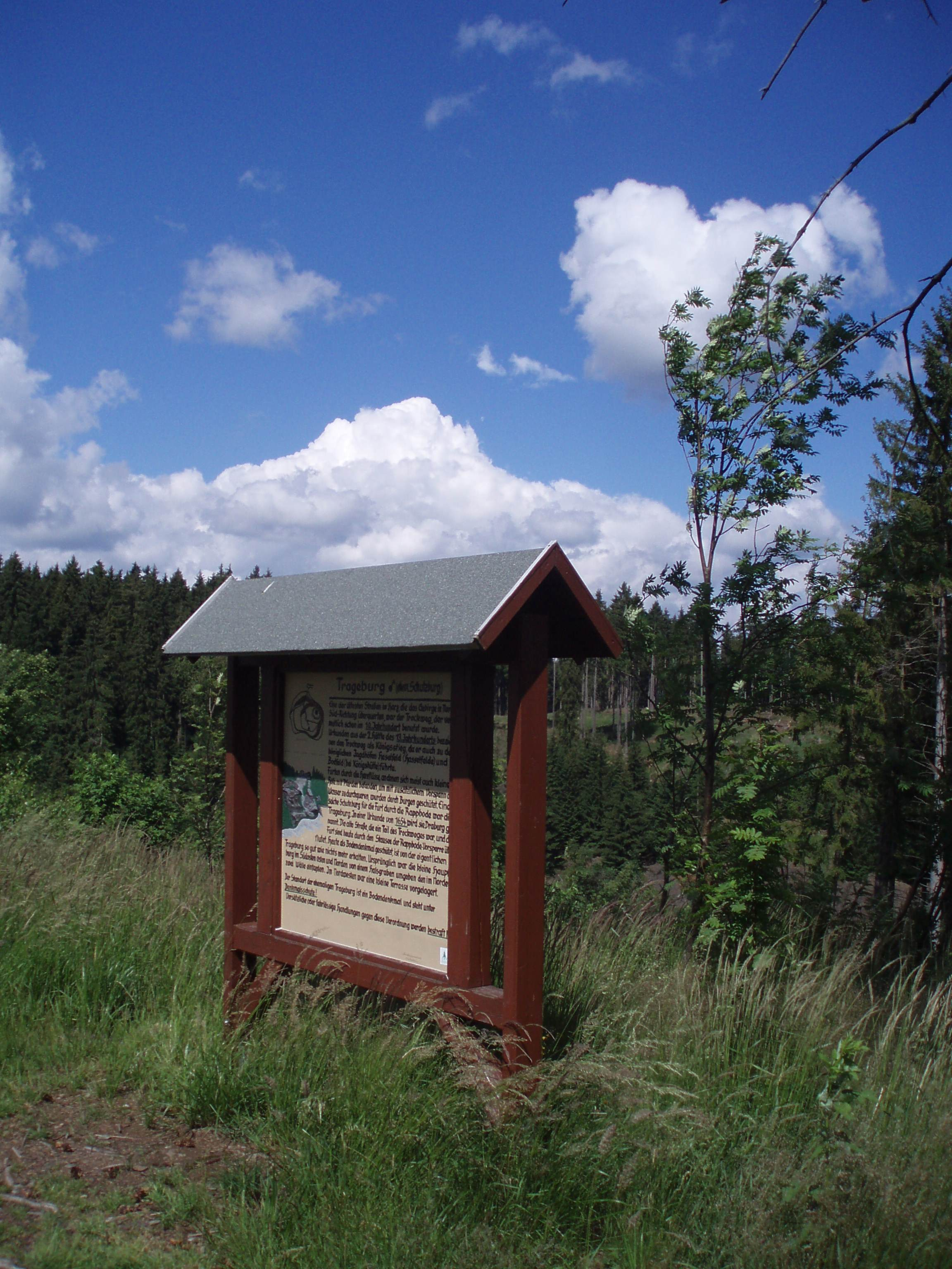 Auf der Trageburg